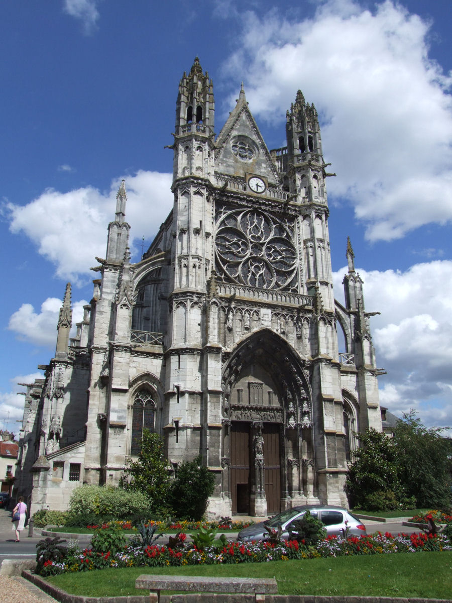 Church of Notre Dame de Vernon, Vernon, Eure, France